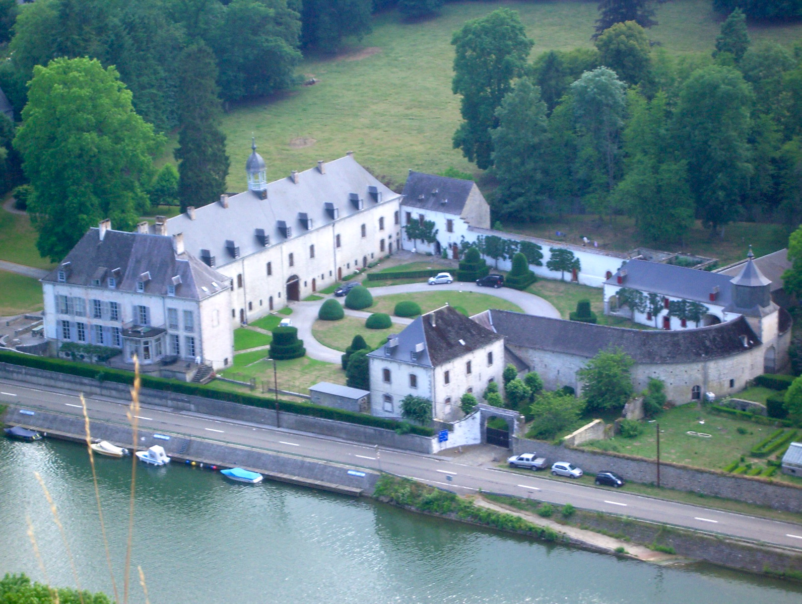 L'ancienne abbaye de Waulsort, improprement nommée "château de Halloy".